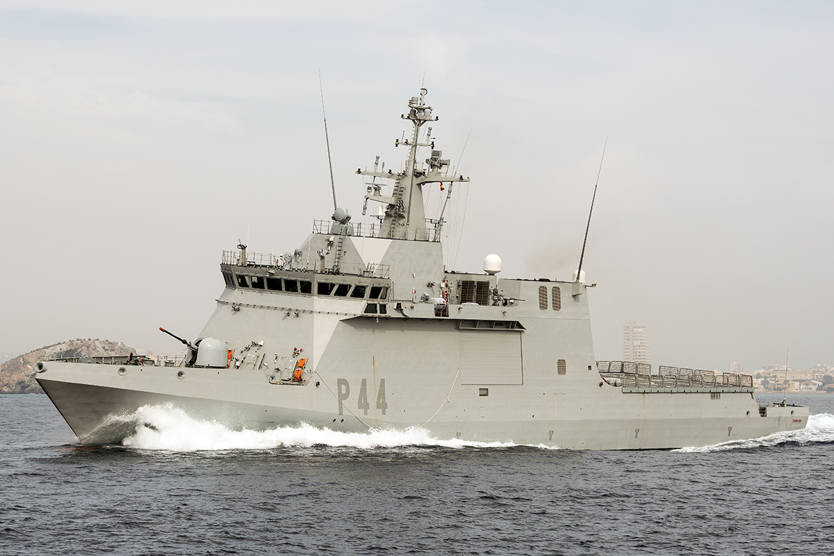 Buque de acción marítima Tornado (P-44) en Mazarrón (Provincia de Murcia).